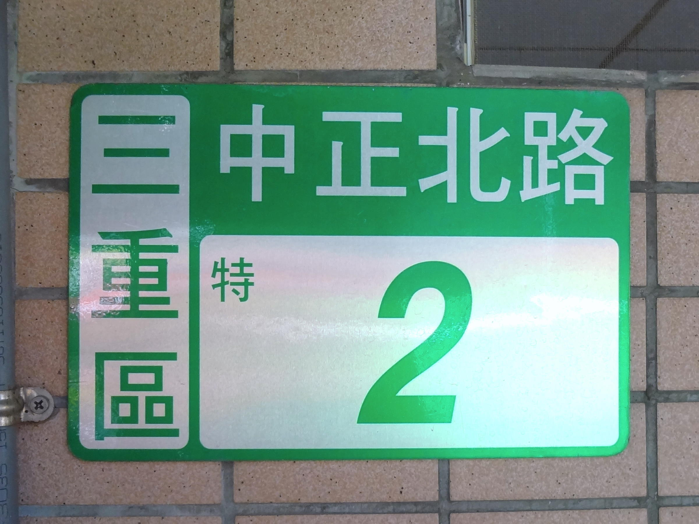 新北市三重區綜合運動場門牌號碼，位於司令臺後方。